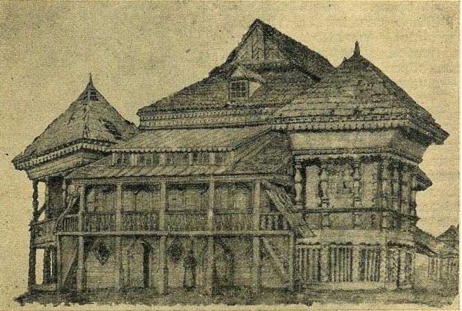 Беларуская (тарашкевіца): Нясьвіж (Niaśviž), Вялікая сынагога